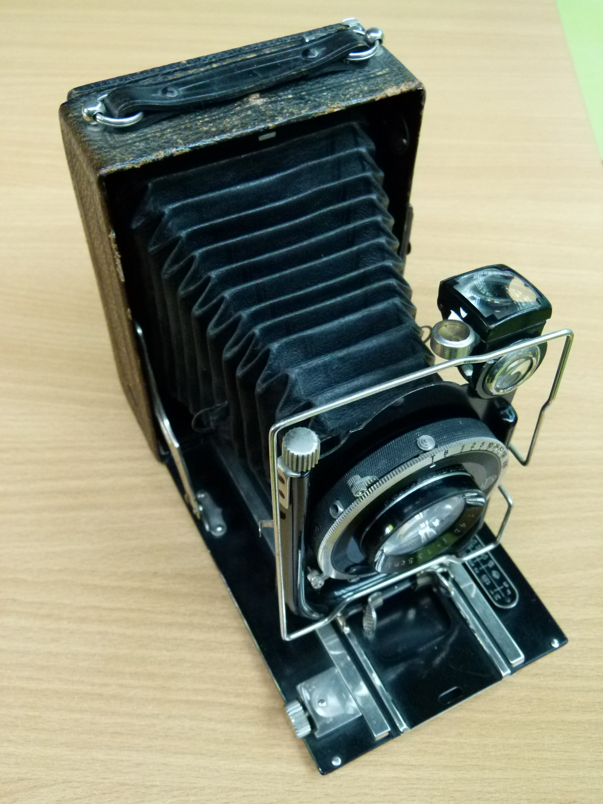 IHAGEE Plattenkamera, Doppel Anastigmat Veraplan 4.5, 13,5 cm, 9x12, 1914, J. Brückner, Dresden, auf dem 9. Geschichtsmarkt Dresden, 23./24.3.2013